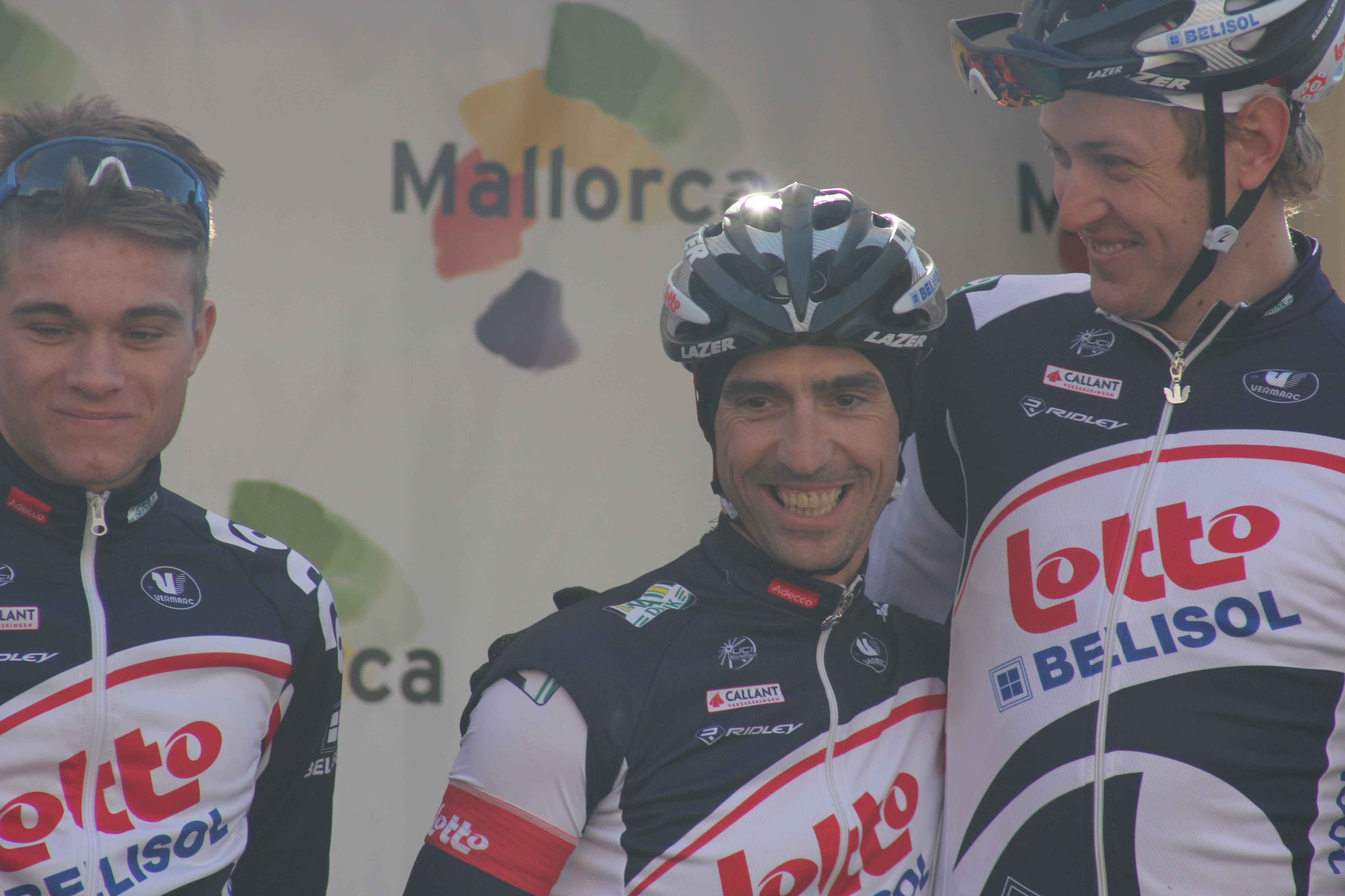 Le Trofeo Palma du Challenge de Majorque (Challenge Vuelta a Mallorca)